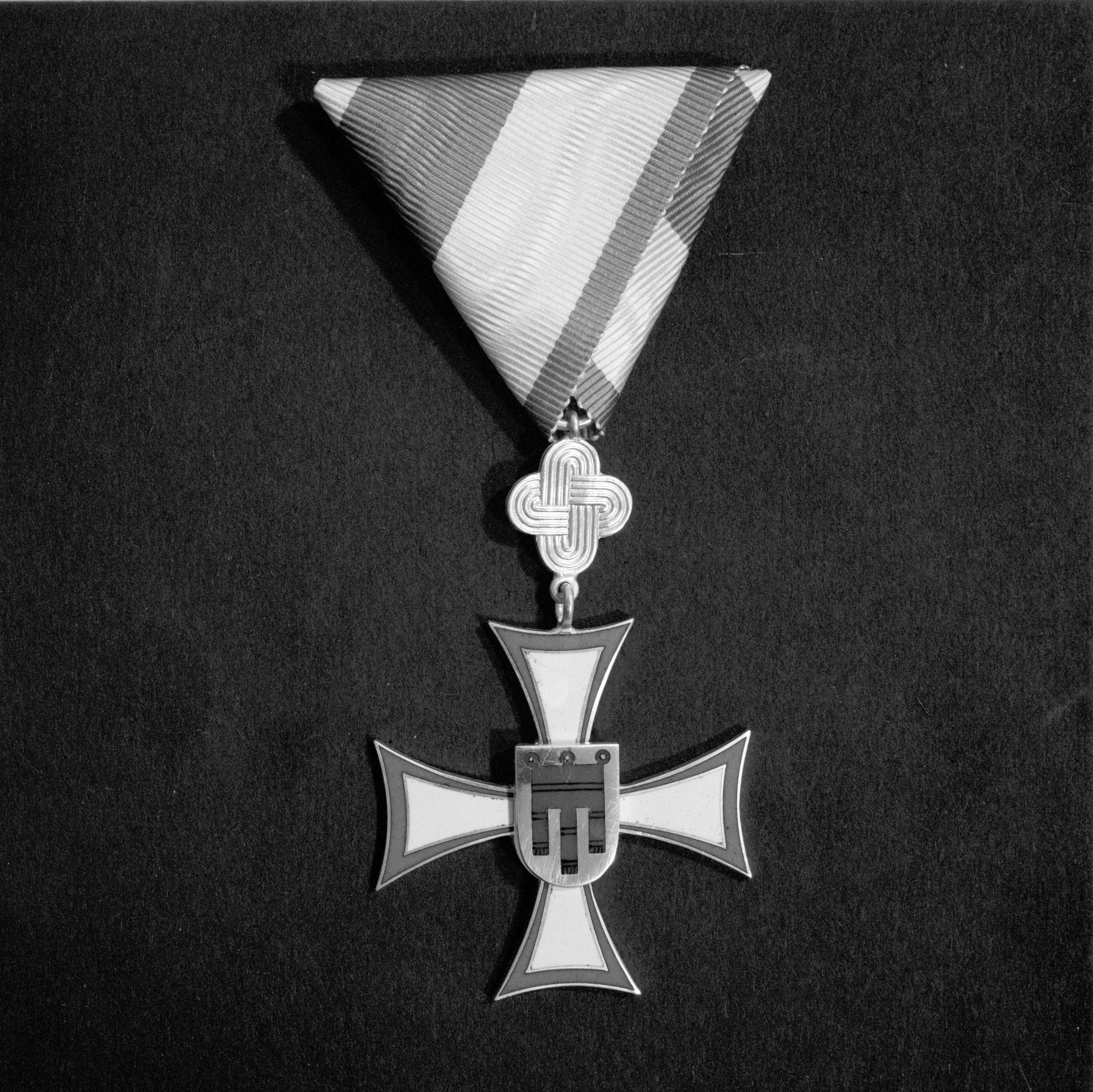 Ehrenzeichen des Landes Vorarlberg. Beim goldenen Ehrenzeichen sind sowohl das Kreuz als auch das Flechtbandornament echt vergoldet, beim silbernen Ehrenzeichen echt versilbert.